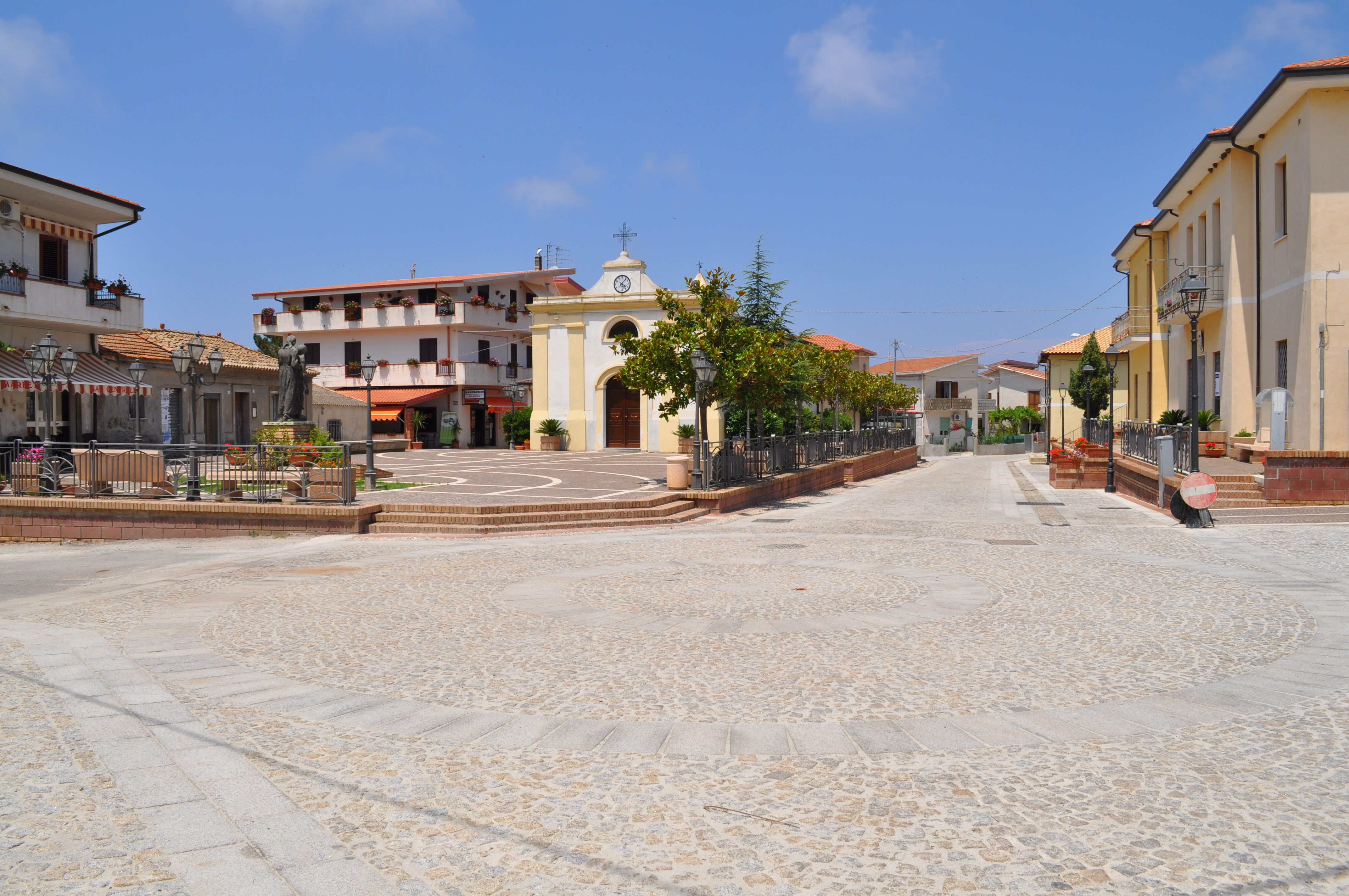 Veduta di Zambrone: la piazza principale "San Carlo Borromeo" con la Chiesa ed il Comune. By